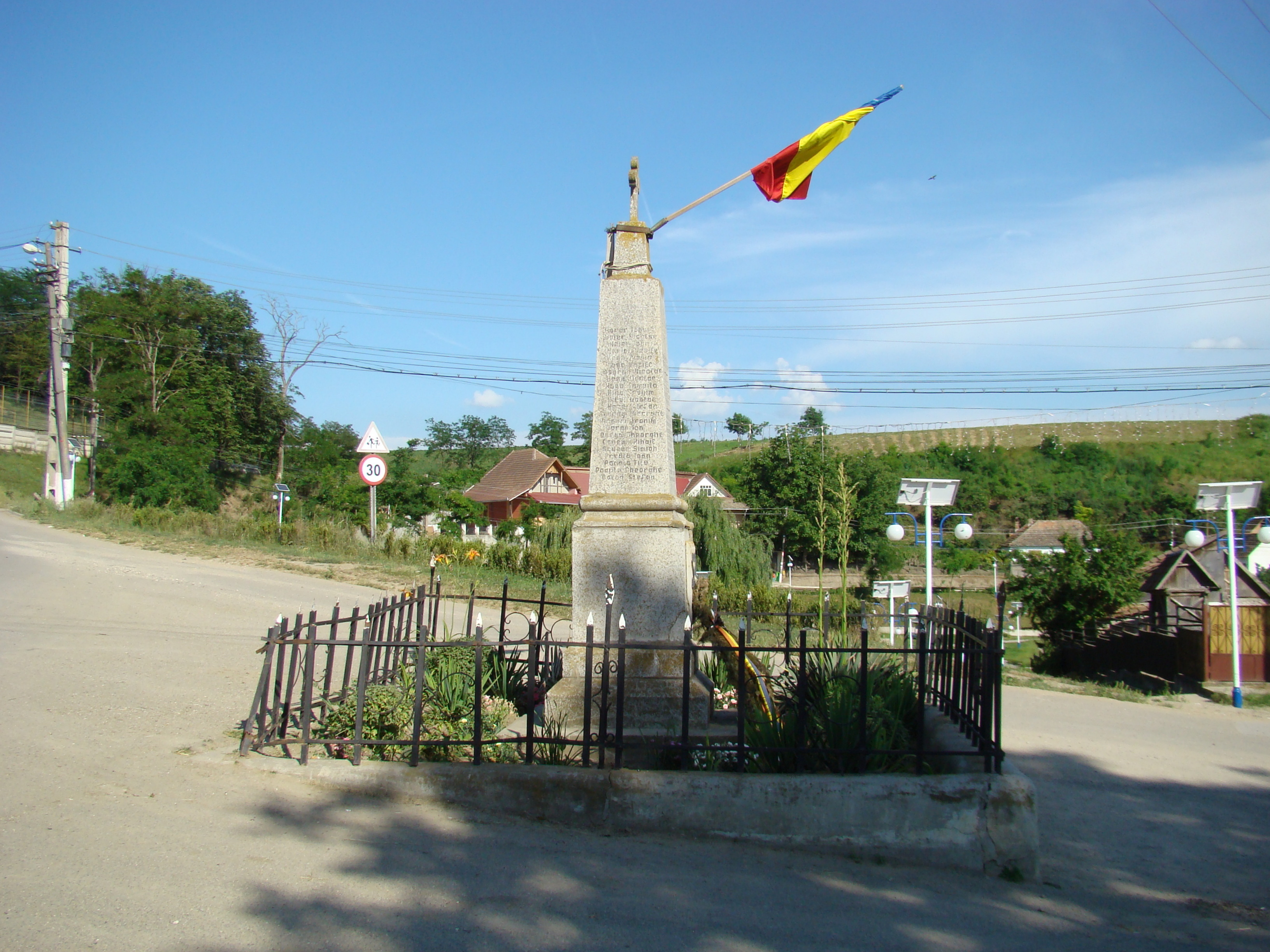 Monumentul Eroilor din Bucerdea Grânoasă, județul Alba